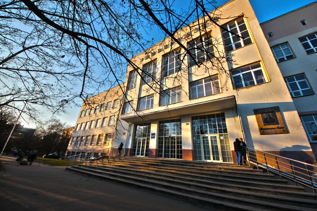 Учебный корпус БФУ им. И. Канта